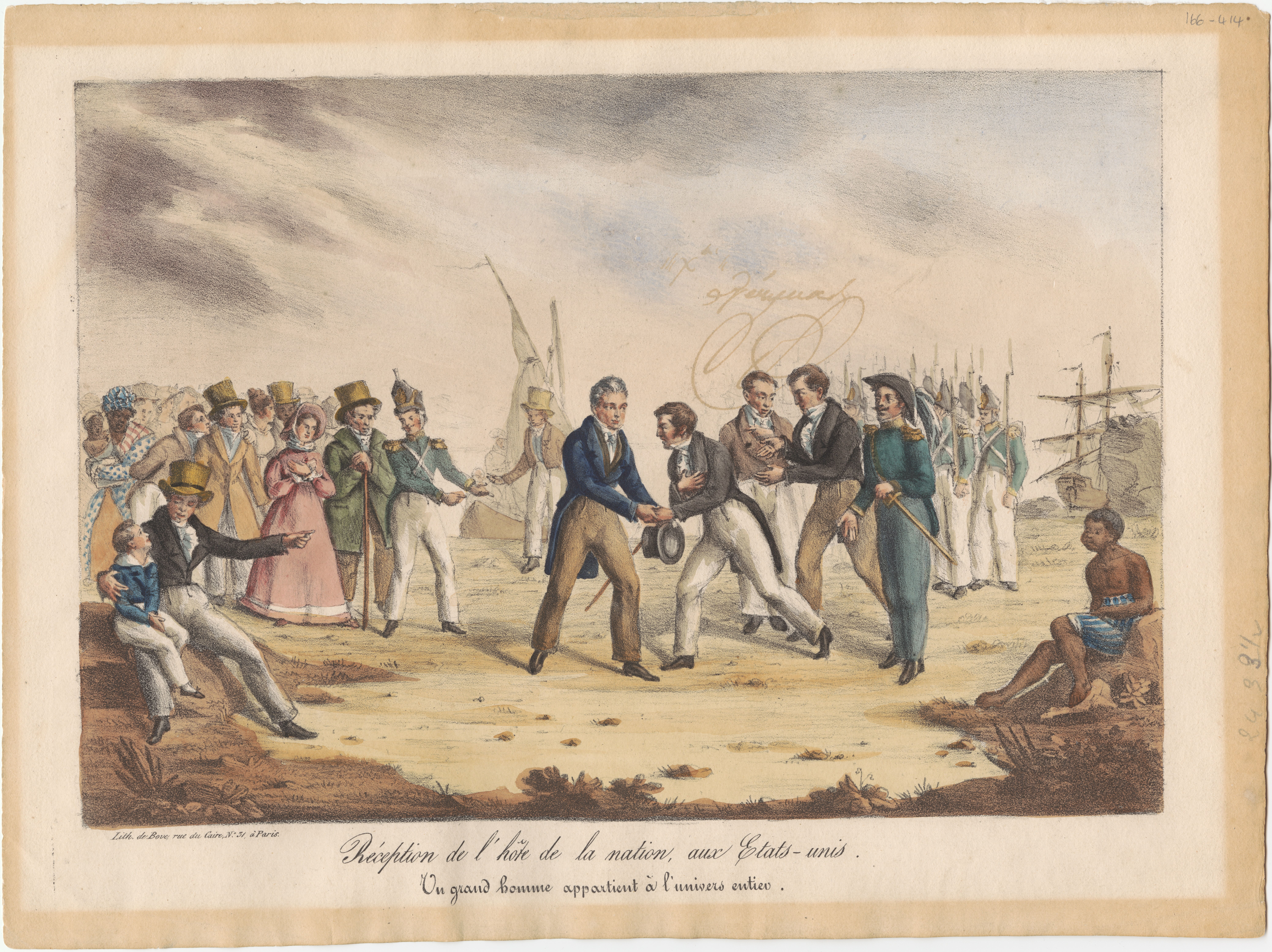 Réception de l'hôte de la nation aux Etats-Unis, un grand homme appartient à l'univers entier - Bové - Lithographie colorée